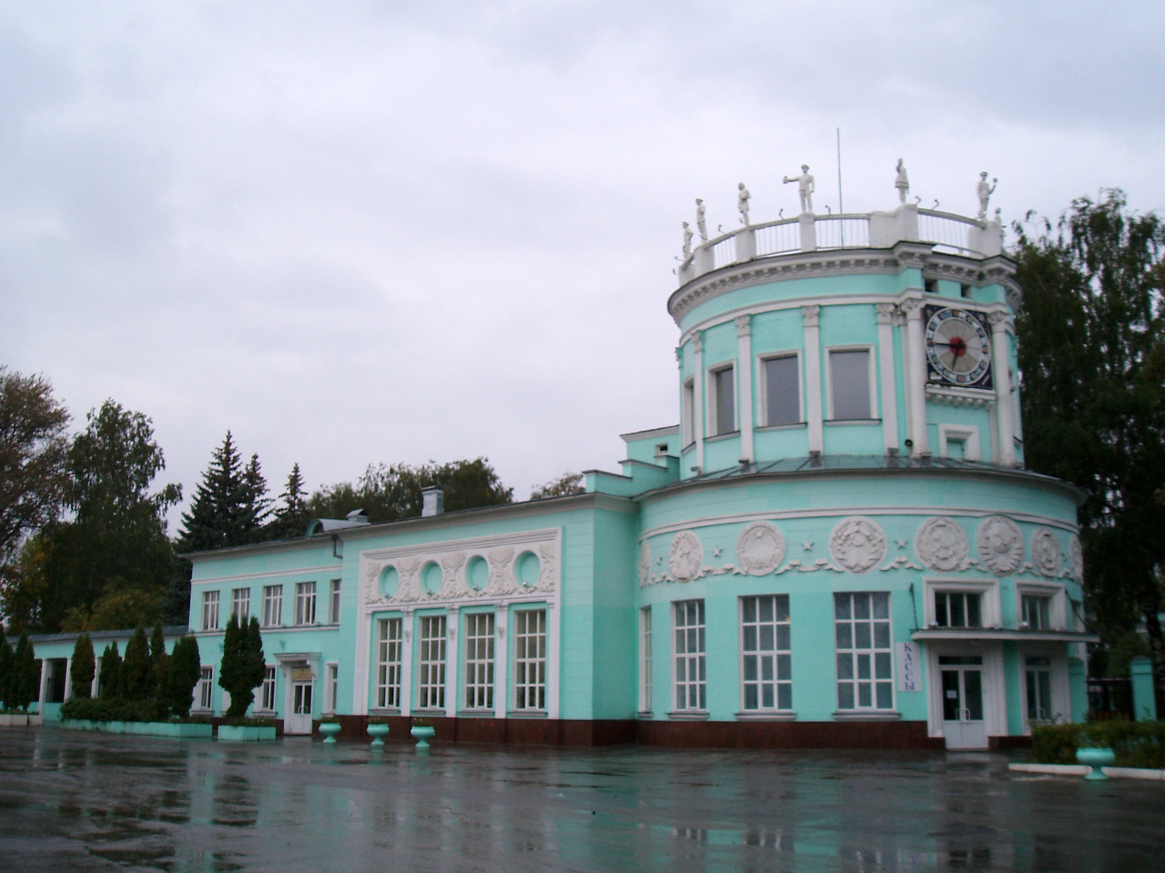 Здание станции Родина ГДЖД